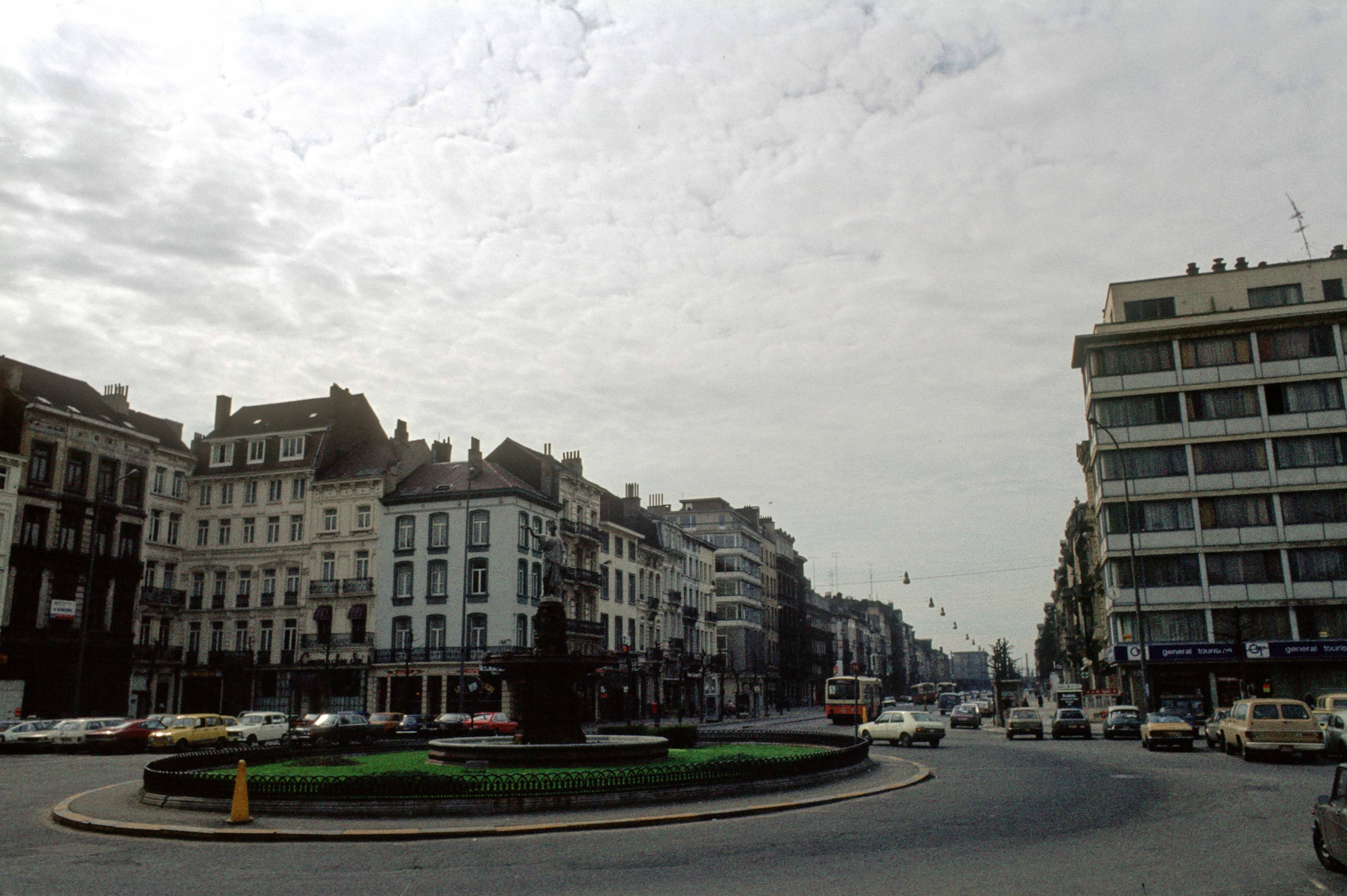 Place Rouppe, Bruxelles